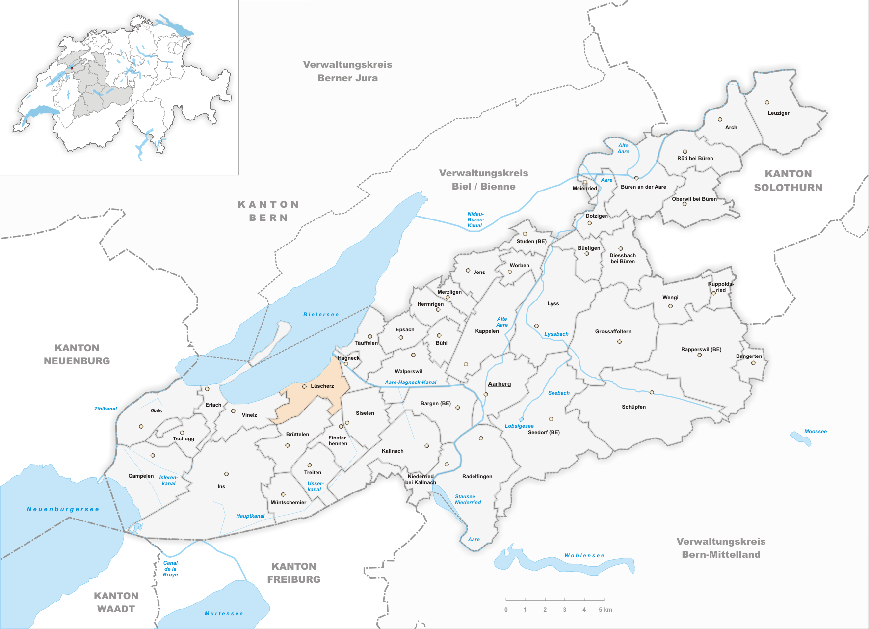 Municipality Lüscherz